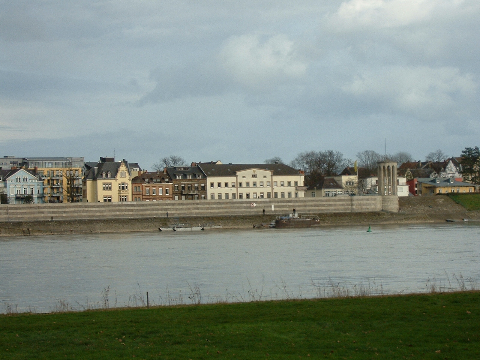 Rheinansicht Neuwied 2 F.Lang eig.Bild 25.02.07